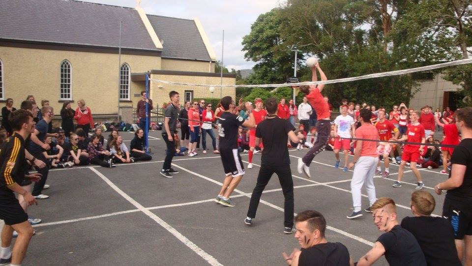 I took this photo when i was at the Gaeltacht